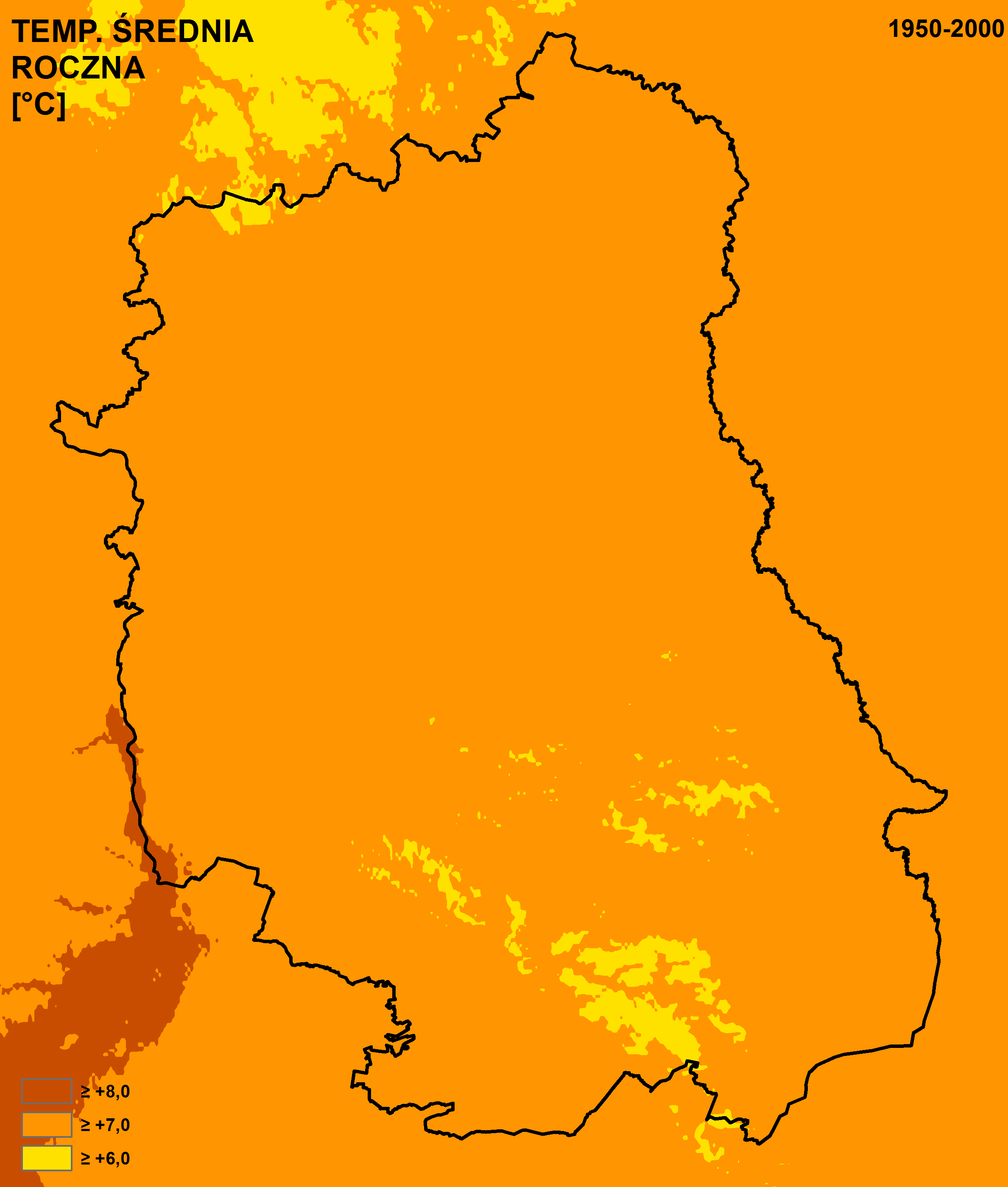 Średnia roczna temperatura województwa lubelskiego w latach 1950-2000